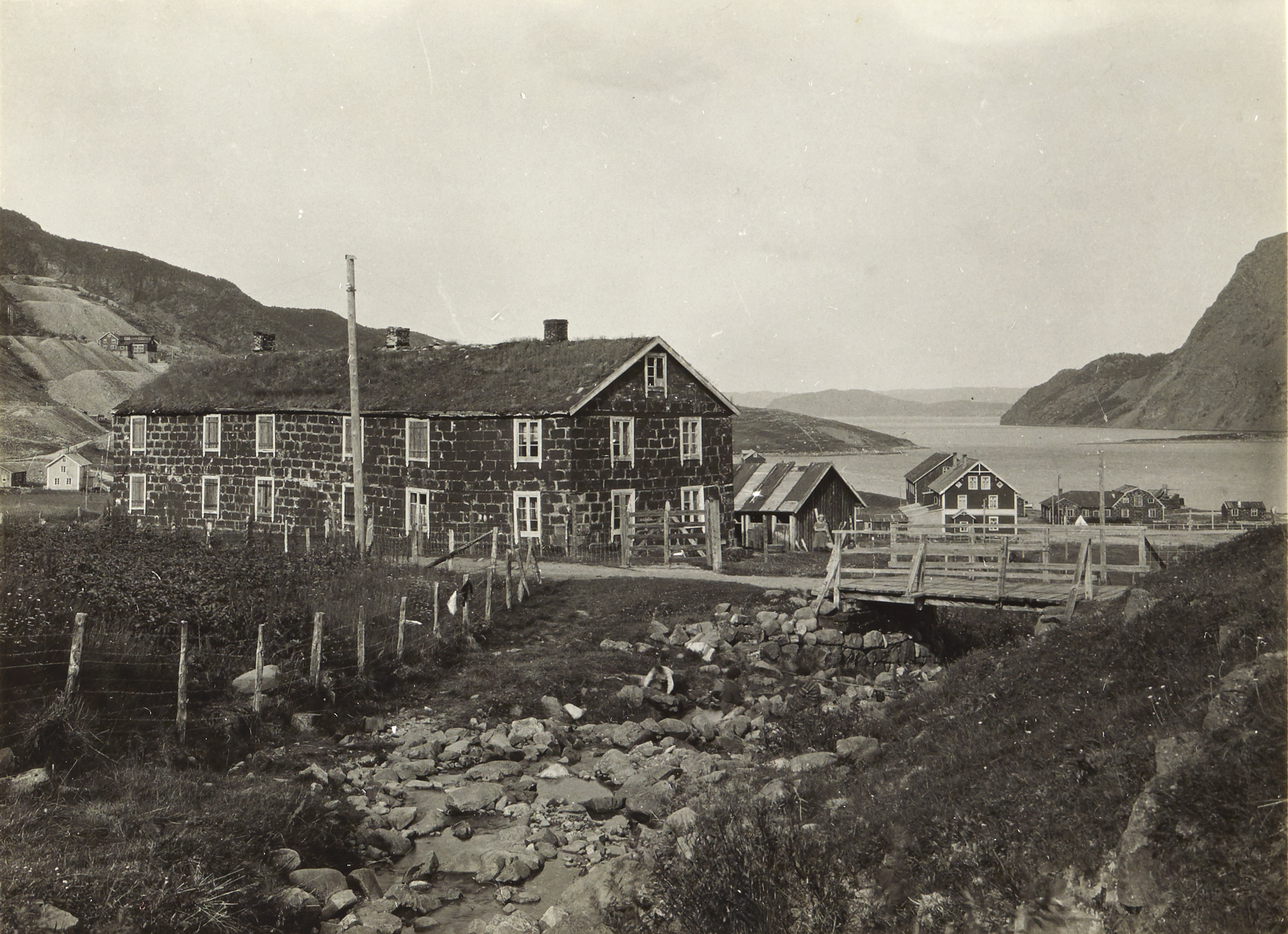 Kobberverket i Kåfjord, Alta